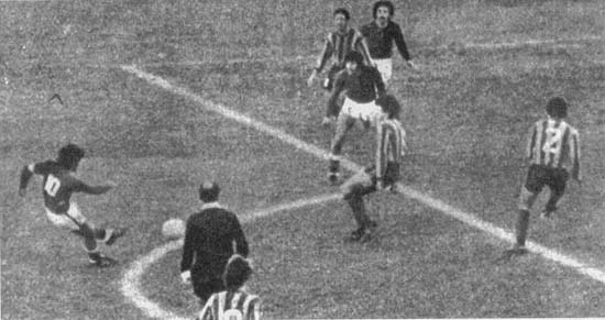 Zurdazo de Mario Zanabria para el empate 2 a 2 ante Central y lograr el título en 1974.